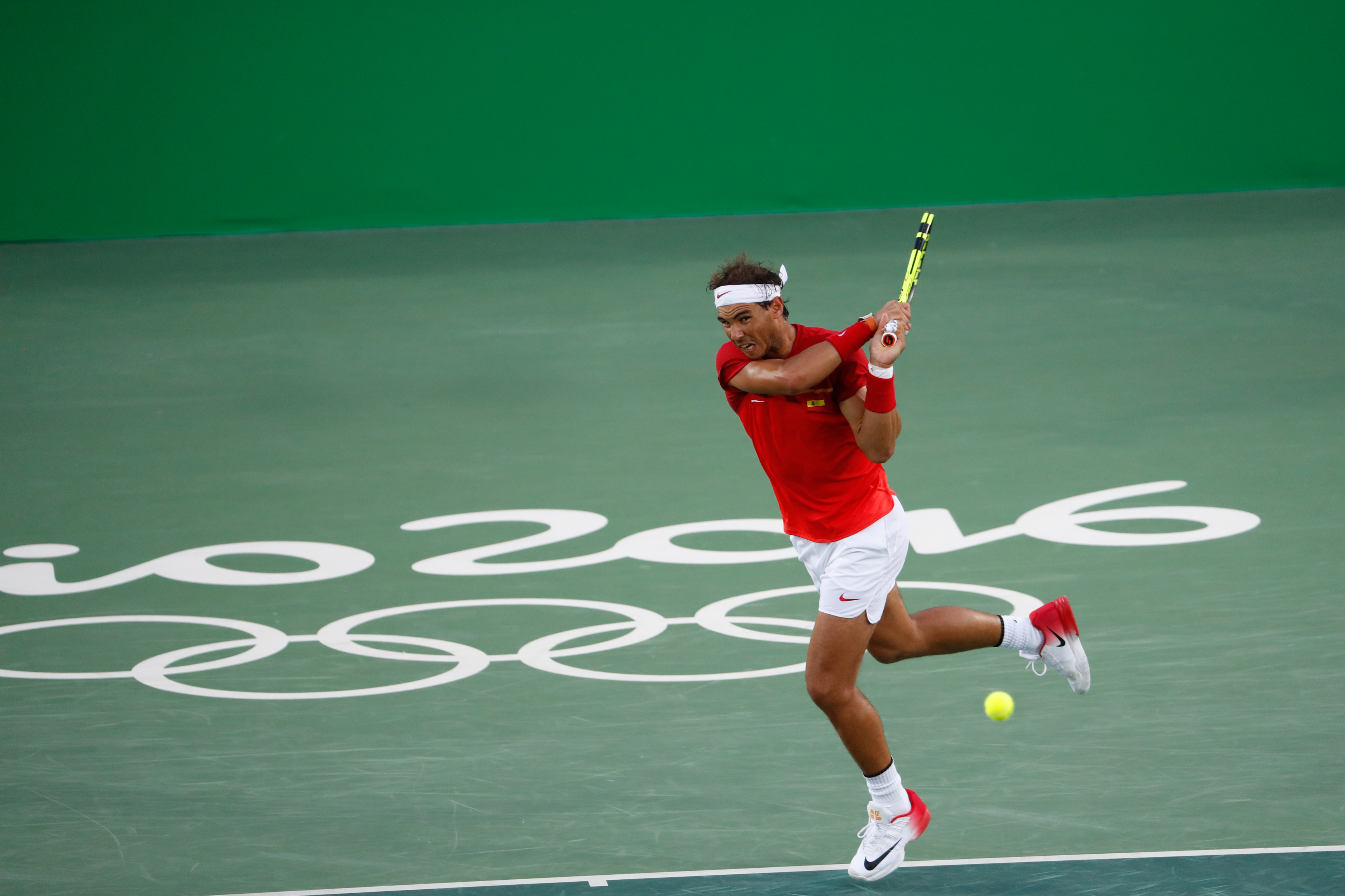 Rio de Janeiro - Tenista brasileiro Thomaz Bellucci é derrotado de virada pelo espanhol Rafael Nadal nas quartas-de-final dos Jogos Olímpicos Rio 2016 (Fernando Frazão/Agência Brasil)